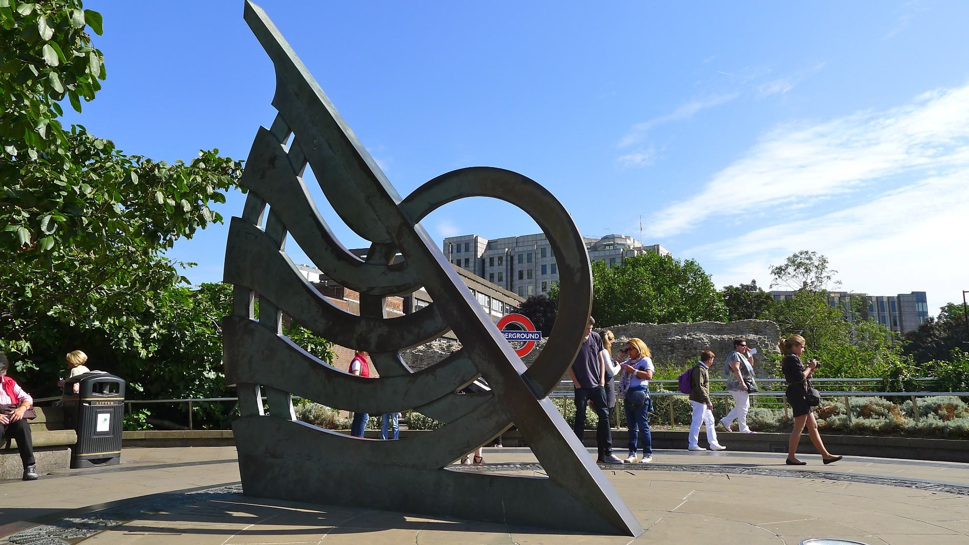 Sundial